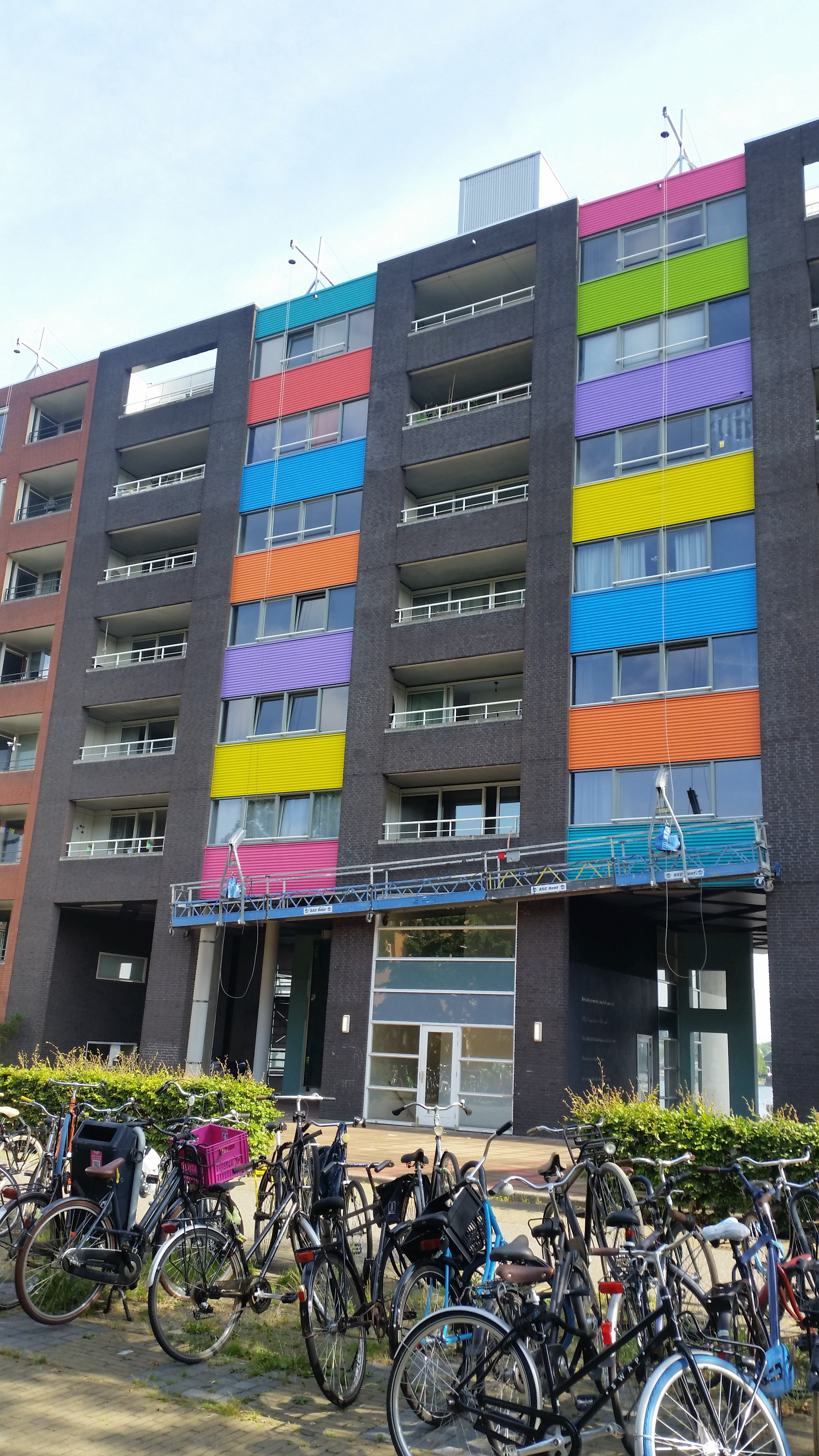 Achtergevel van een gebouw van Sjoerd Soeters aan Imogirituin, Amsterdam